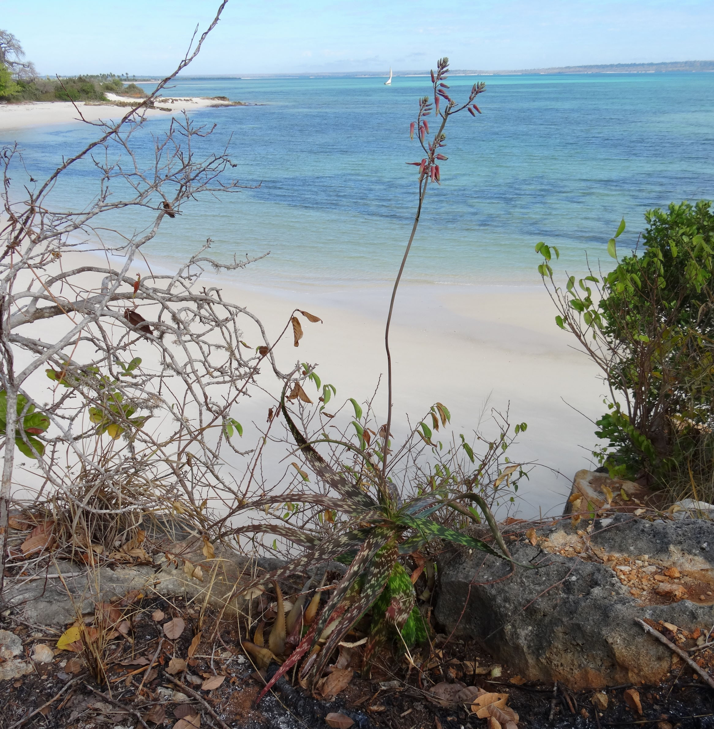 Aloe mossurilensis in Mossuril district